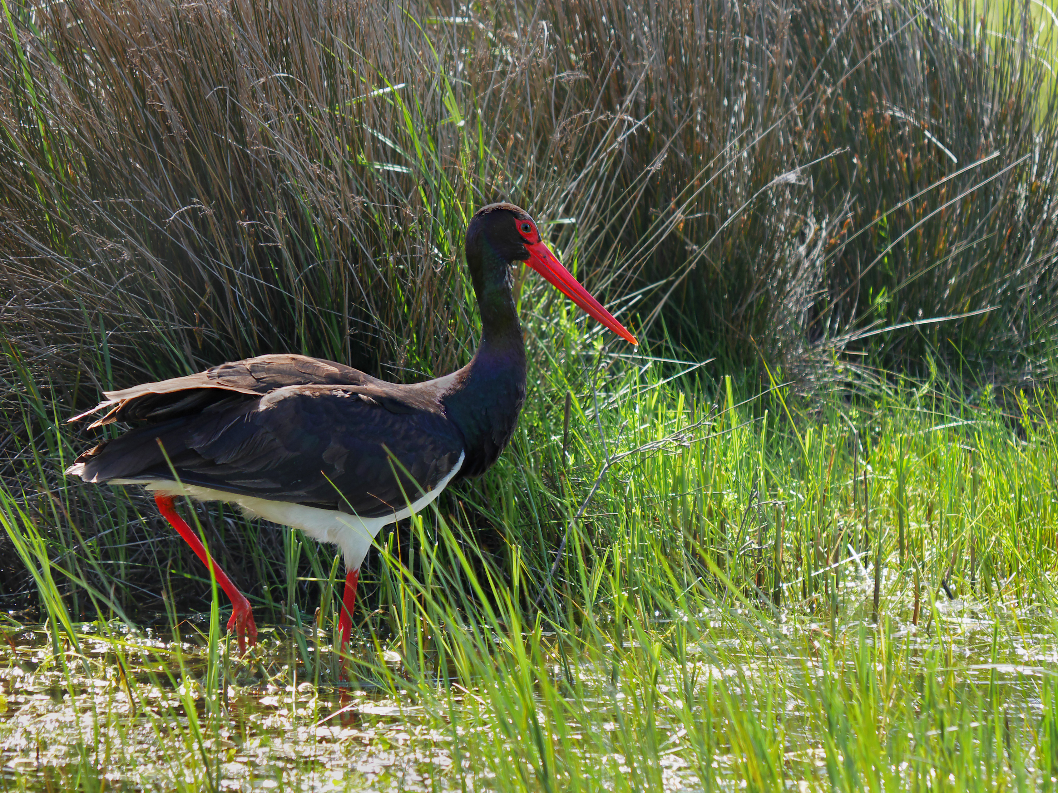 Panasonic GX7 + Panasonic Lumix G Vario 100-300, O.I.S